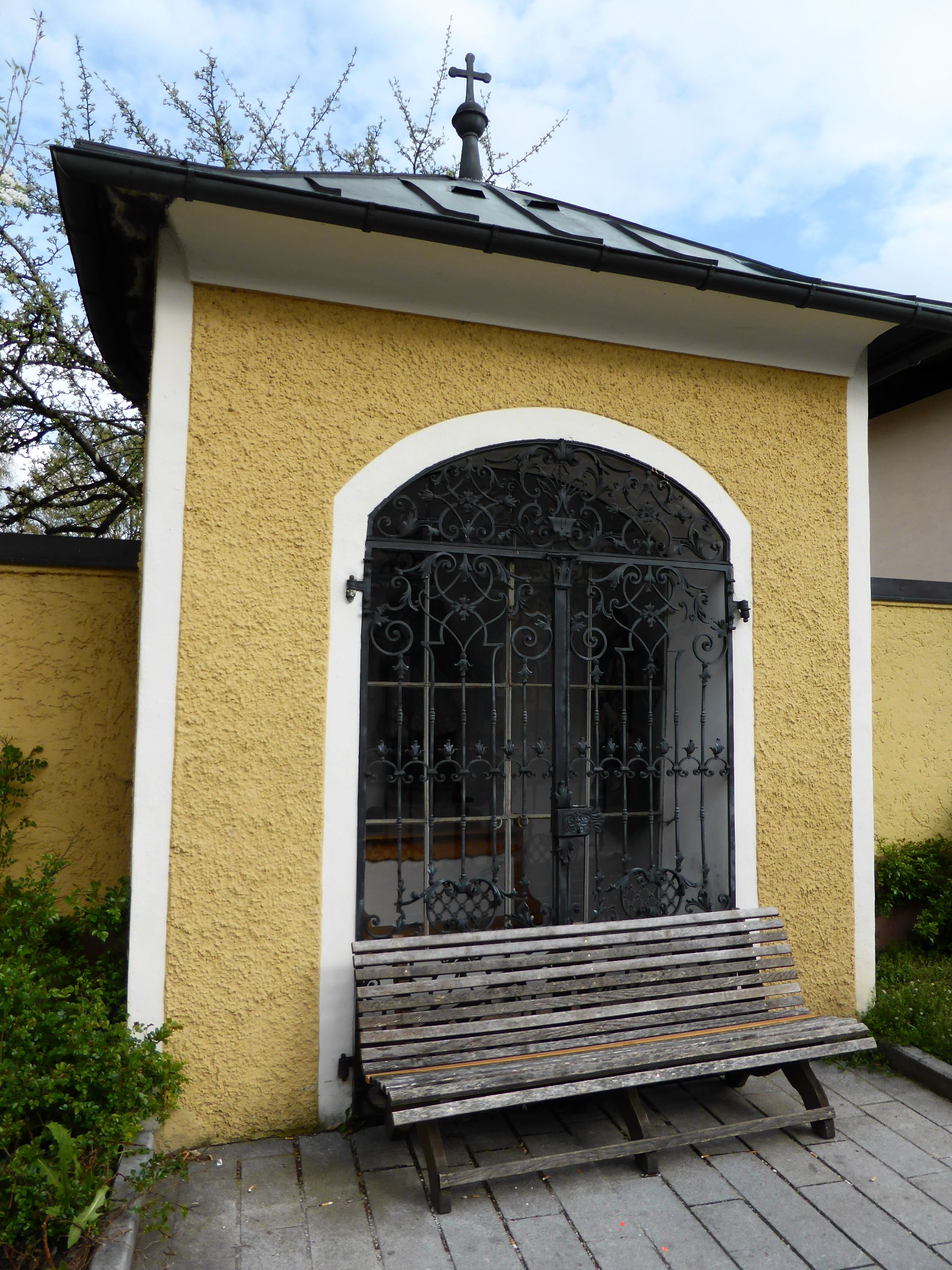 Gerichtskapelle